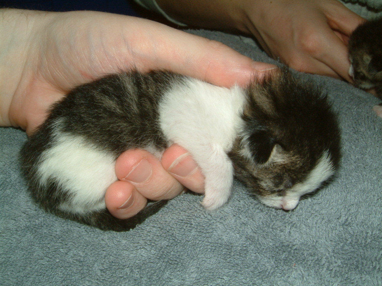 Kasimir (3 Tage alt, 126 Gramm) nach dem Füttern in meiner Hand